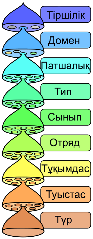 Қазақша (кирил): Хайуанат, өсімдік секілді тіршілік түрлерін таксономиялық жіктеу